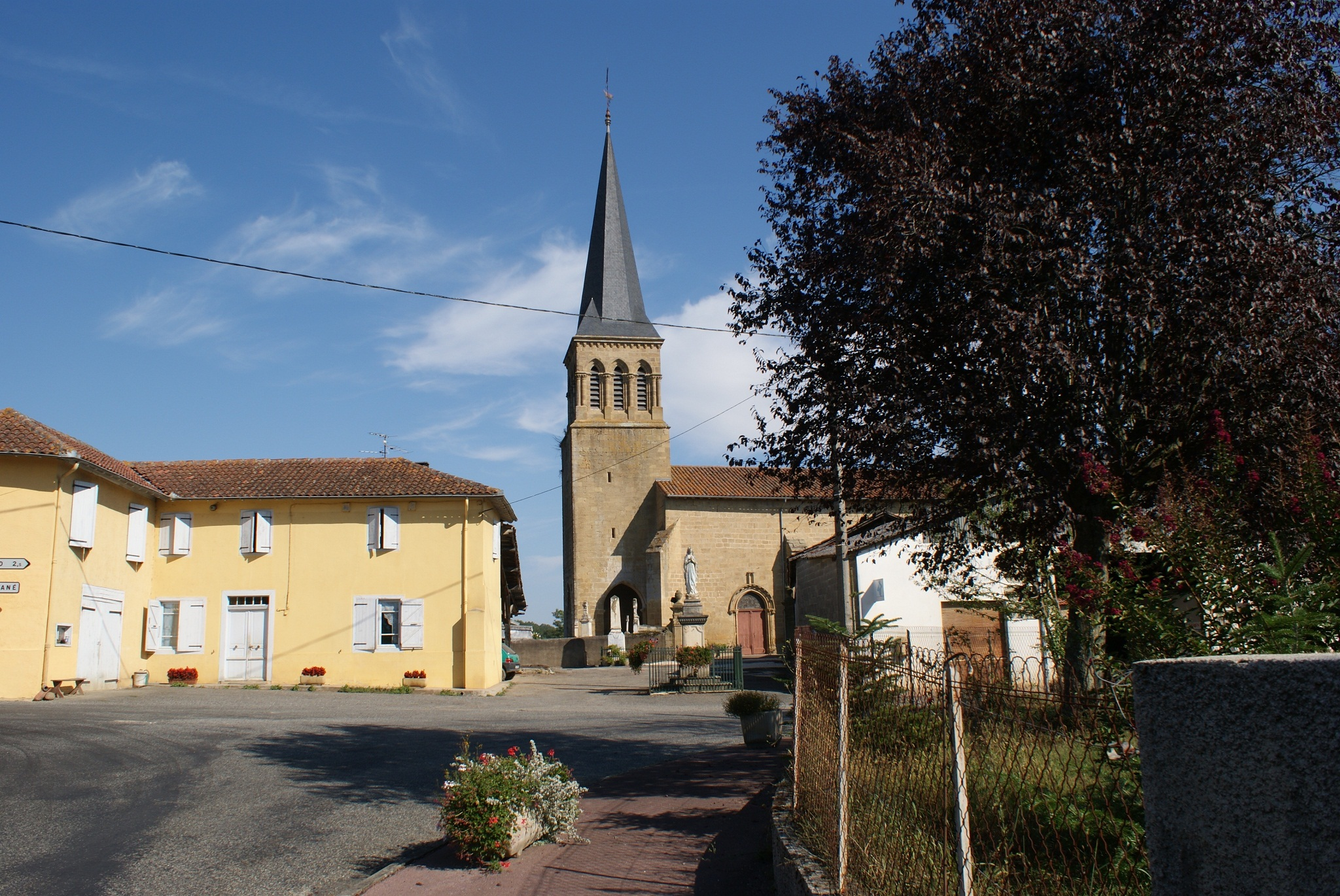 De kerk van Lalanne-Arque.